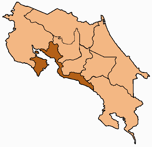 Mappa della diocesi di Puentarenas, in Costa Rica. Lavoro personale, eseguito a partire da questa immagine di Commons. Fonte per i confini delle diocesi